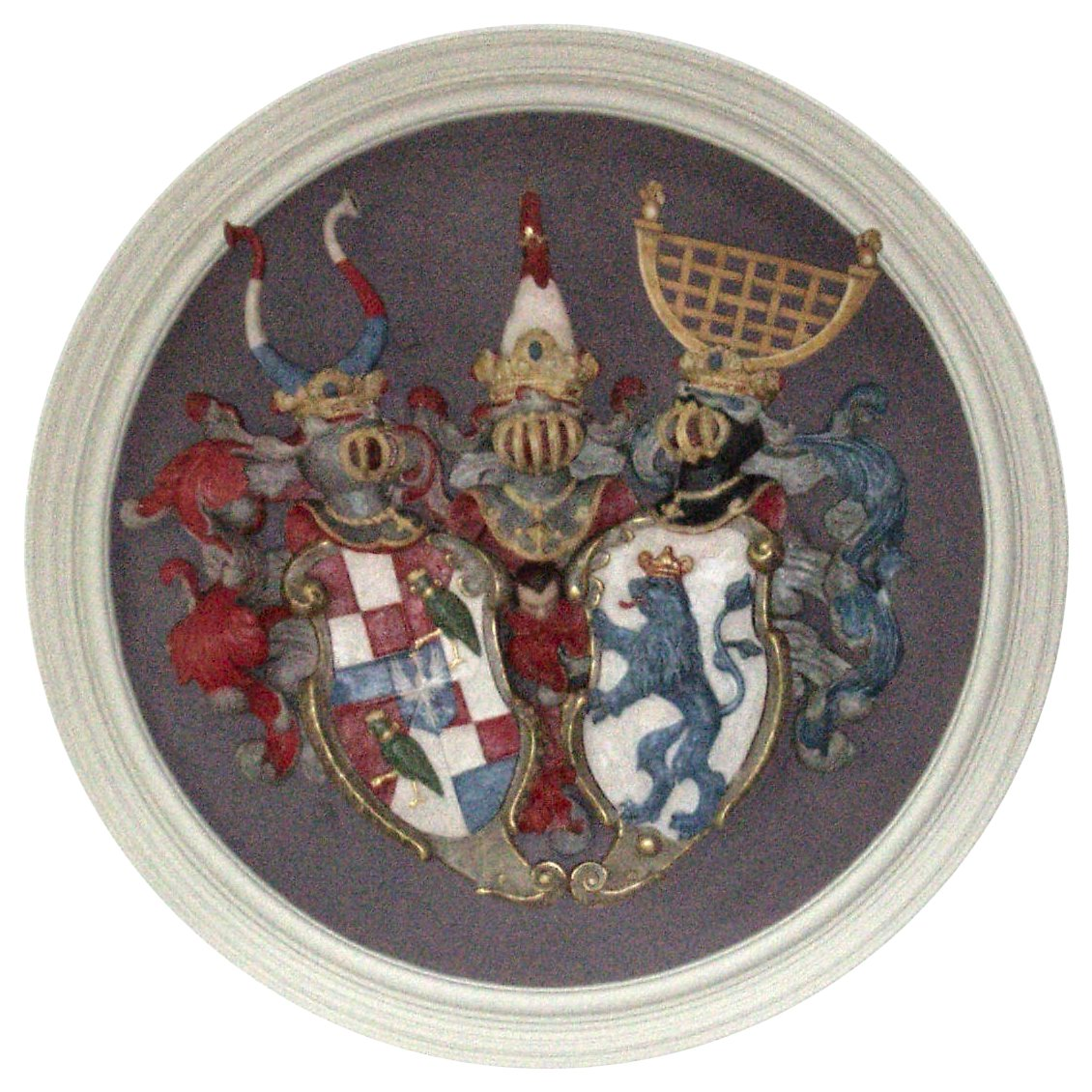 St. Cyriakus, Dürnau; Allianzwappen des Christoph Martin von Degenfeld und seiner Gattin von Adelmannsfelden. Im Degenfelder Wappen befindet sich seit der Erhebung Christoph Martins in den Freiherrenstand 1625 ein silberner Adler. Die bekrönten grünen Sittiche stammen aus der Zeit Christophs von Degenfeld, der sie aus dem Wappen seiner Gattin Barbara von Stammheim übernahm. Der Kopf der männlichen Figur, der zwischen den beiden herzförmig arrangierten Wappen hervorschaut, ist ungedeutet. Ein blauer steigender Löwe mit zwei Schweifen gehört zum Wappen derer von Adelmannsfelden. Als Helmzier dienen dem Degenfelder Wappen Büffelhörner, dem der Adelmannsfeldener ein halbes goldenes Sieb mit Straußenfedern.